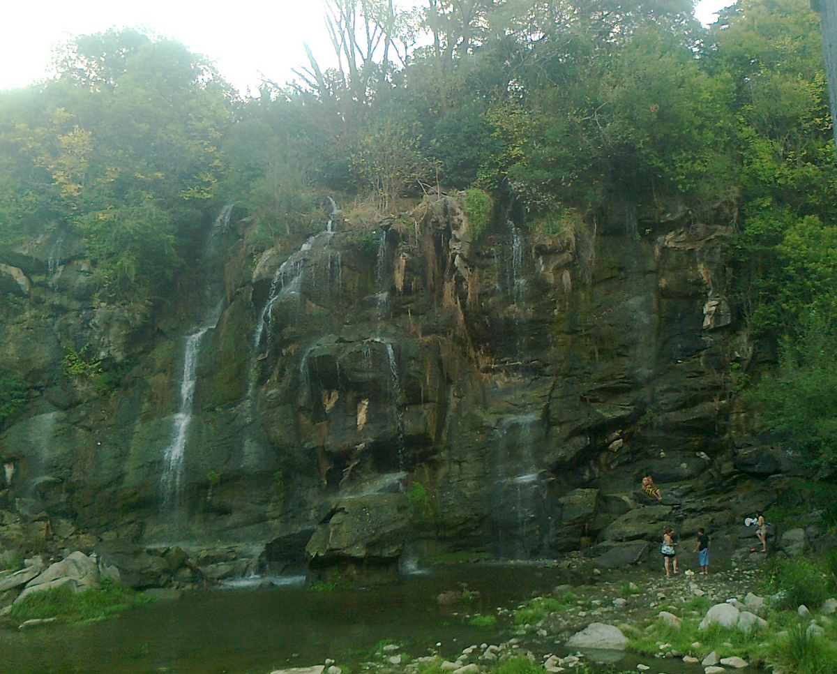 El balneario Siete Cascadas, atracción turística en La Falda.